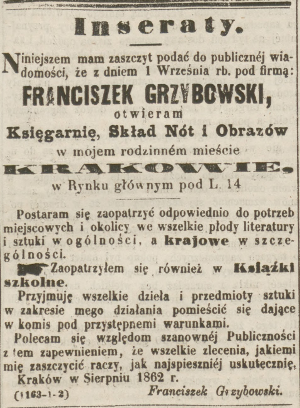 Franciszek Grzybowski, ogłoszenie o otwarciu księgarni w Krakowie, Czas nr 196, s. 4, 27 sierpnia 1862